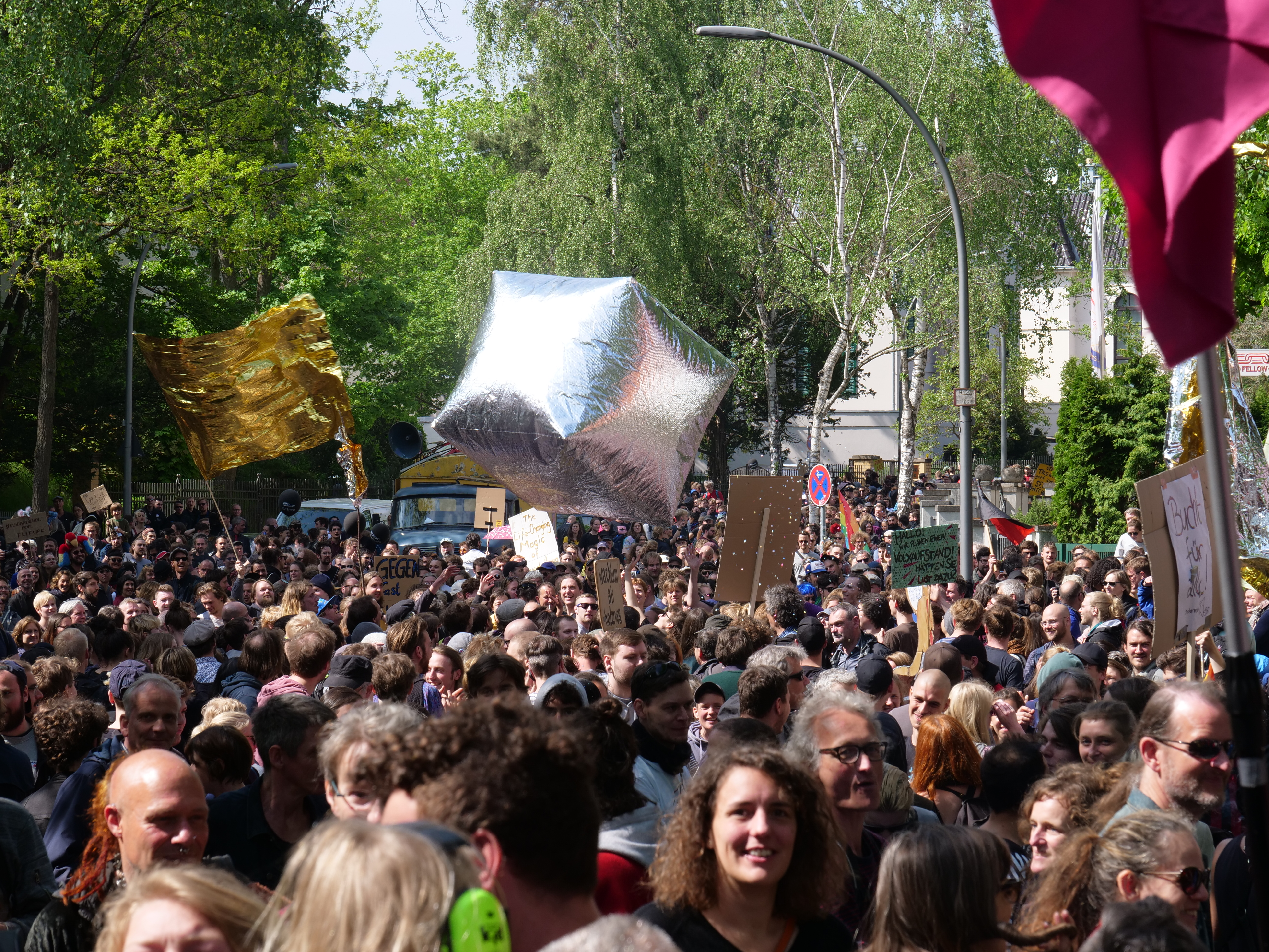 Demonstration zum ersten Mai im Grunewald in Berlin in 2019.